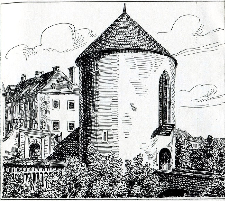 Zeichnung des Webertores in Görlitz